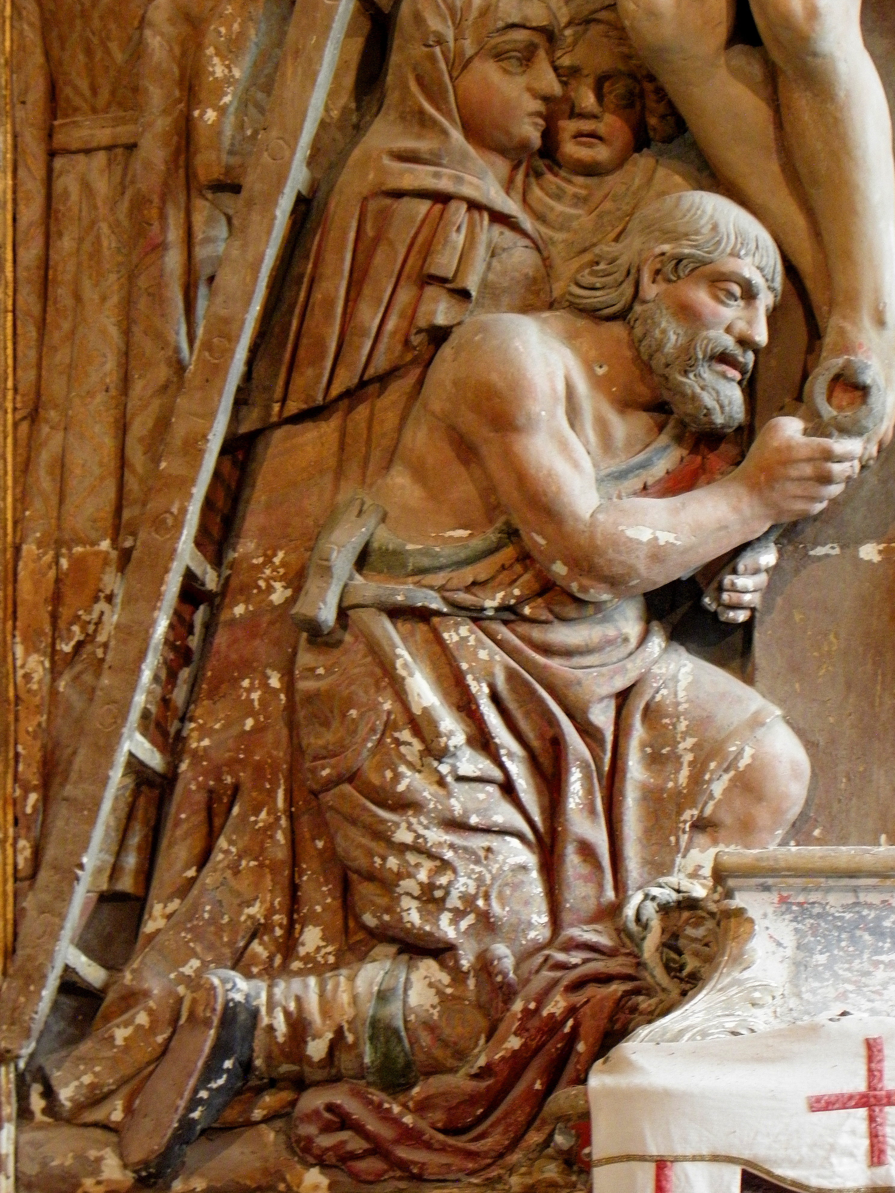 Autel et retable de la Descente de Croix en la chapelle Saint-Nicodème, commune de Pluméliau (56). Saint-Nicodème.